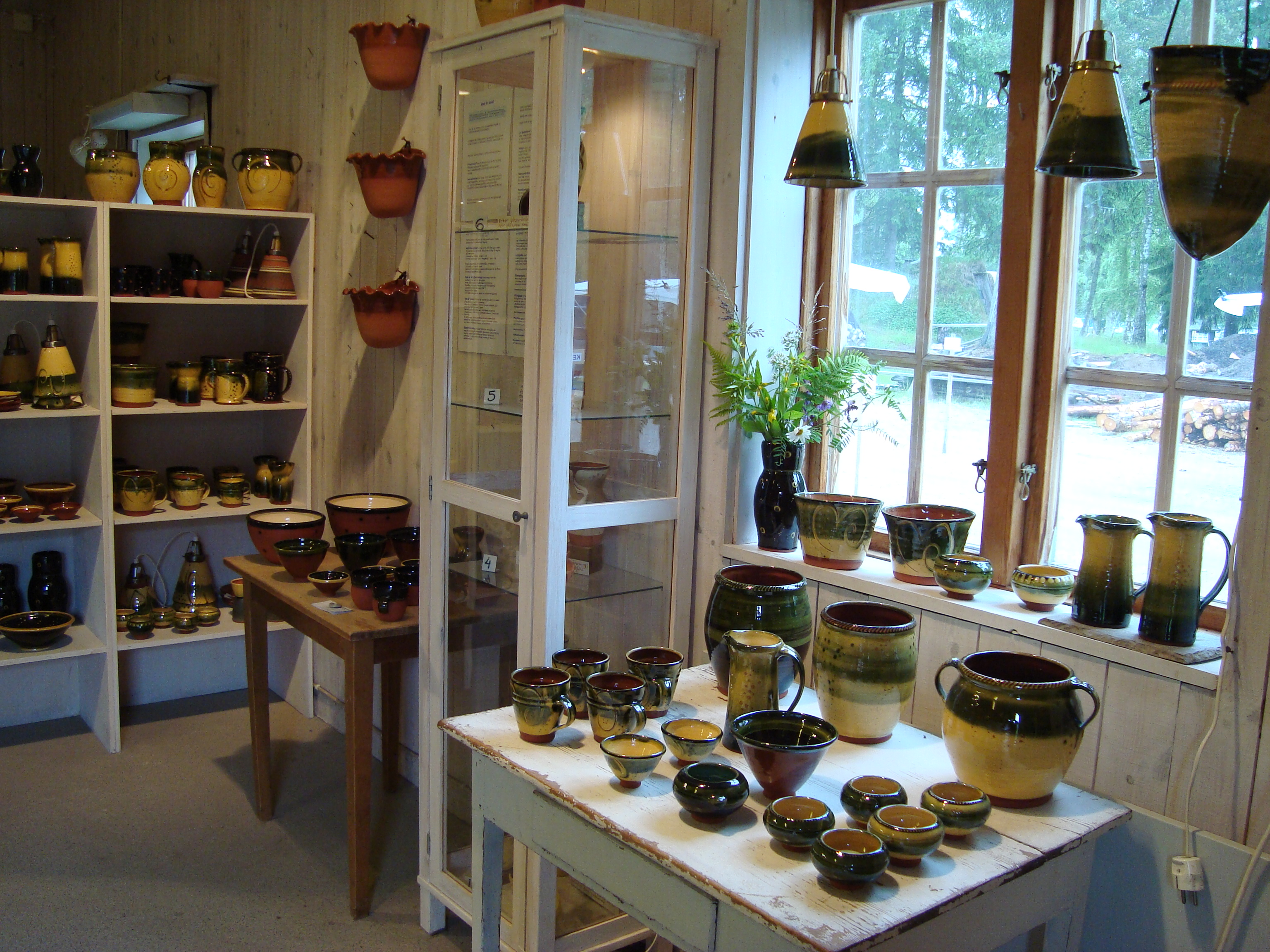 Interiör från Brunskogs Keramik.